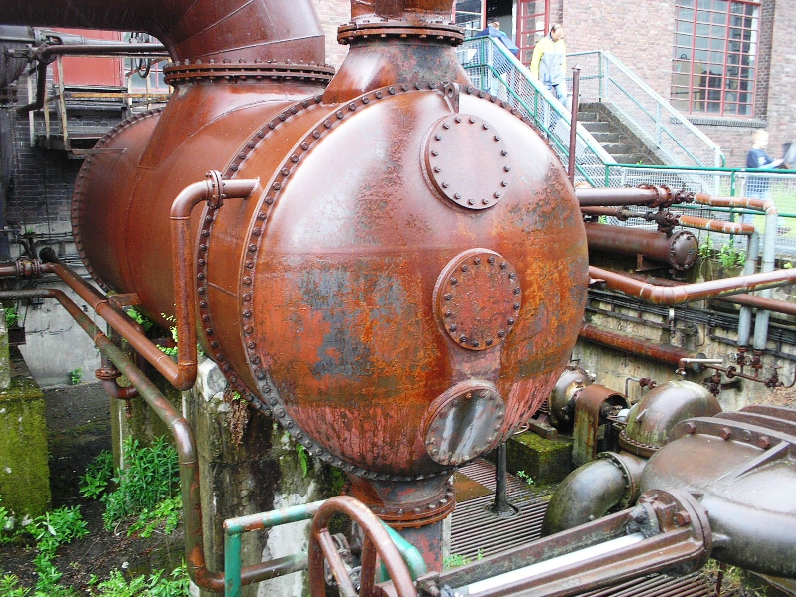 Ein Kessel in der Kokerei Hansa, Dortmund